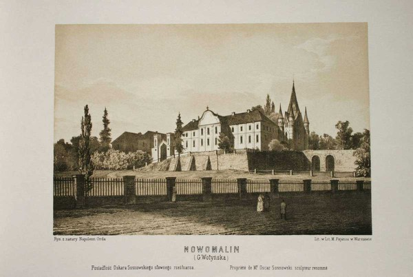 с. Новомалин